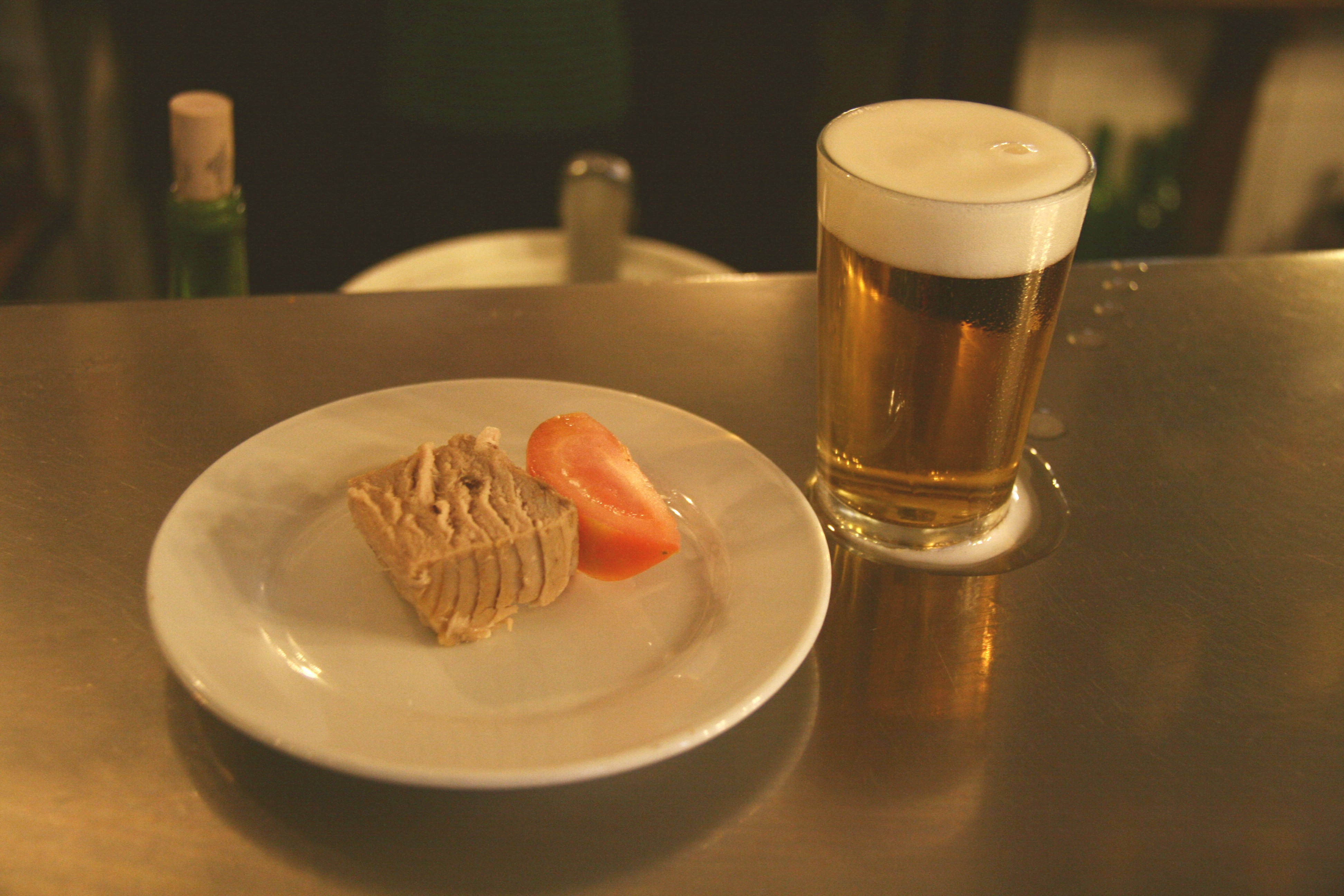 Tapa con caña en Casa Labra